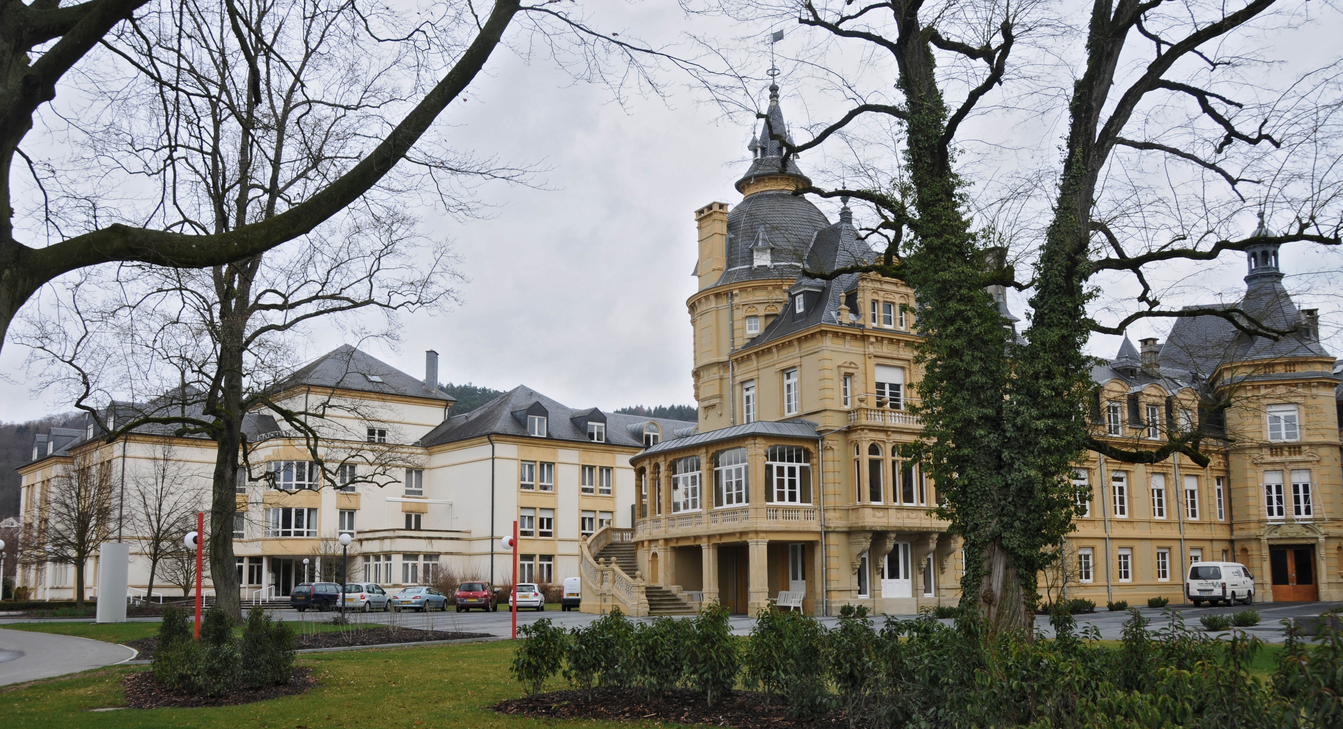 Le château de Heisdorf (Luxembourg)